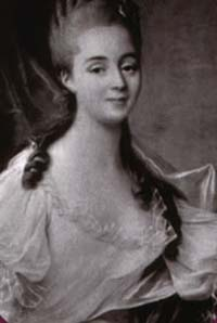 Portrait de Anne Couppier de Romans (1737-1808), baronne de Meilly-Coulanges, marquise de Cavanac